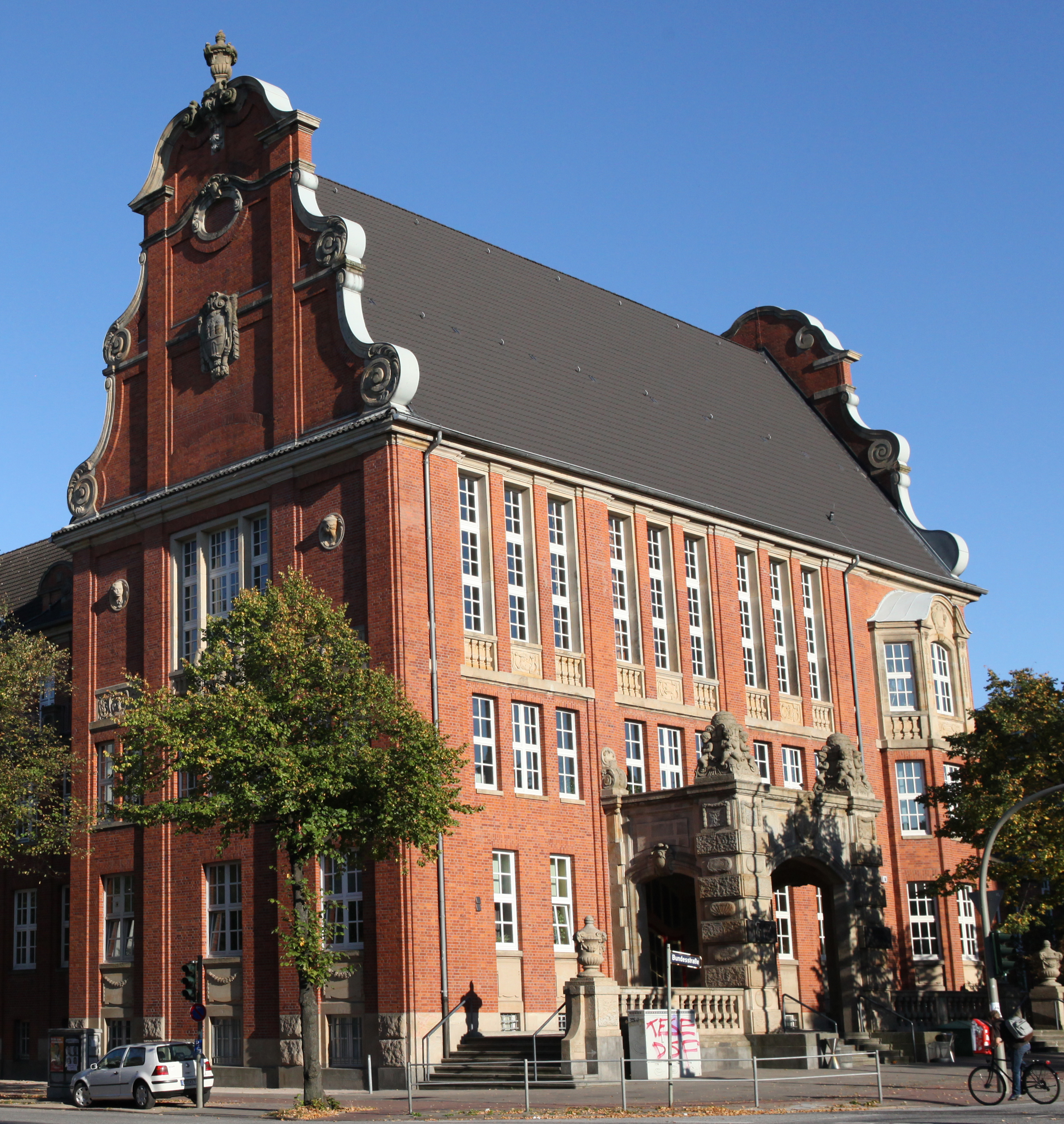 Wiki loves Monuments Deutschland Hamburg Eimsbüttel Nr 1747. Ehemaliges Heinrich-Hertz-Realgymnasium, heute Gewerbeschule G2, erbaut 1910 von Alfred Erbe. This is a photograph of an architectural monument.